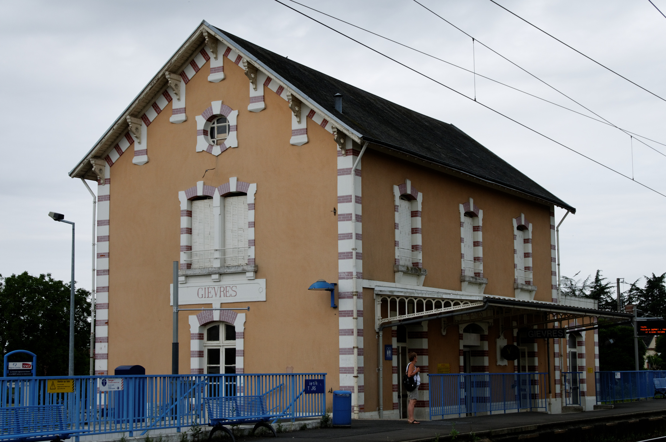 Gare de Gièvres, Loir-et-Cher, France